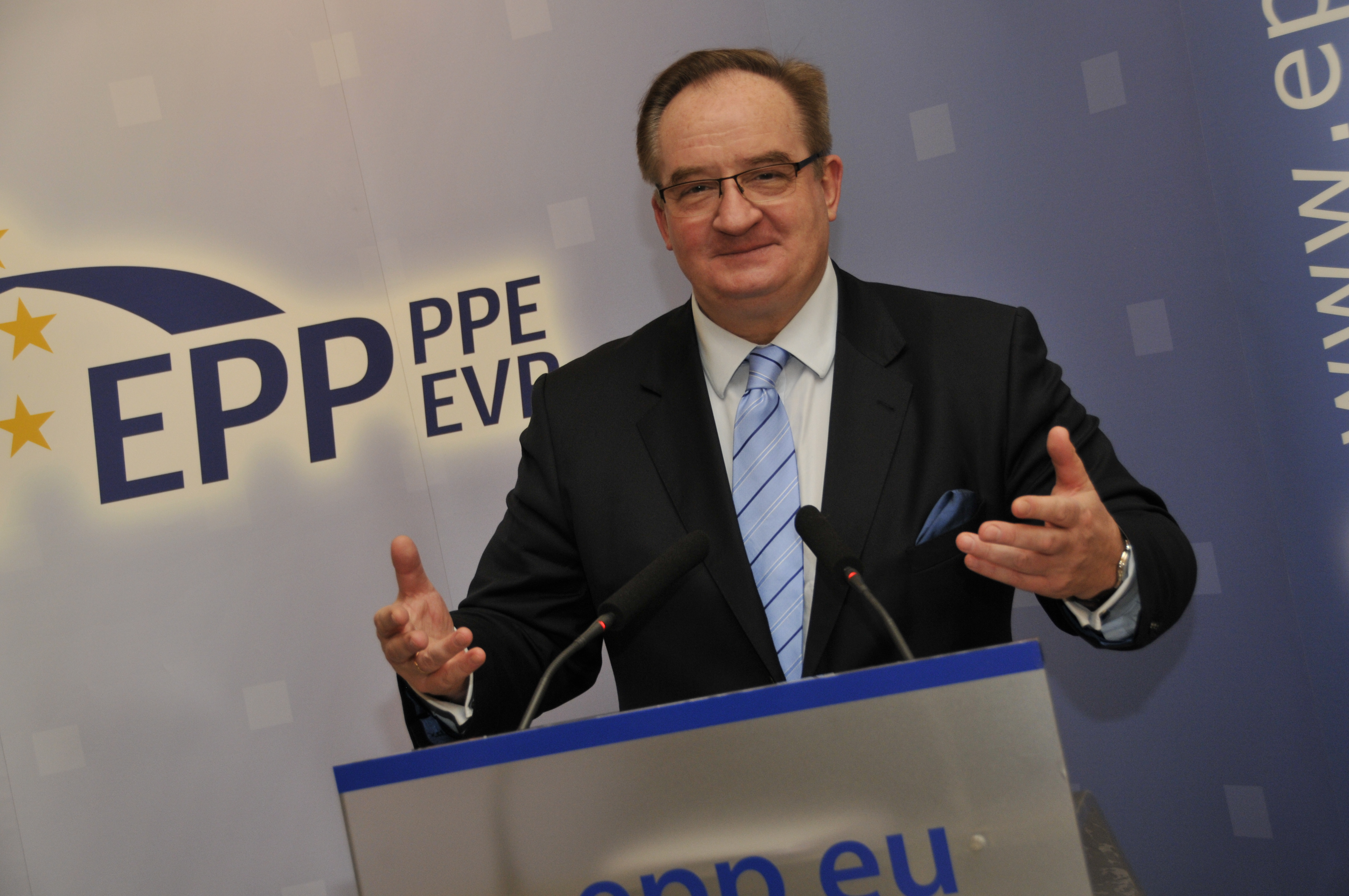 EPP Summit December 2010